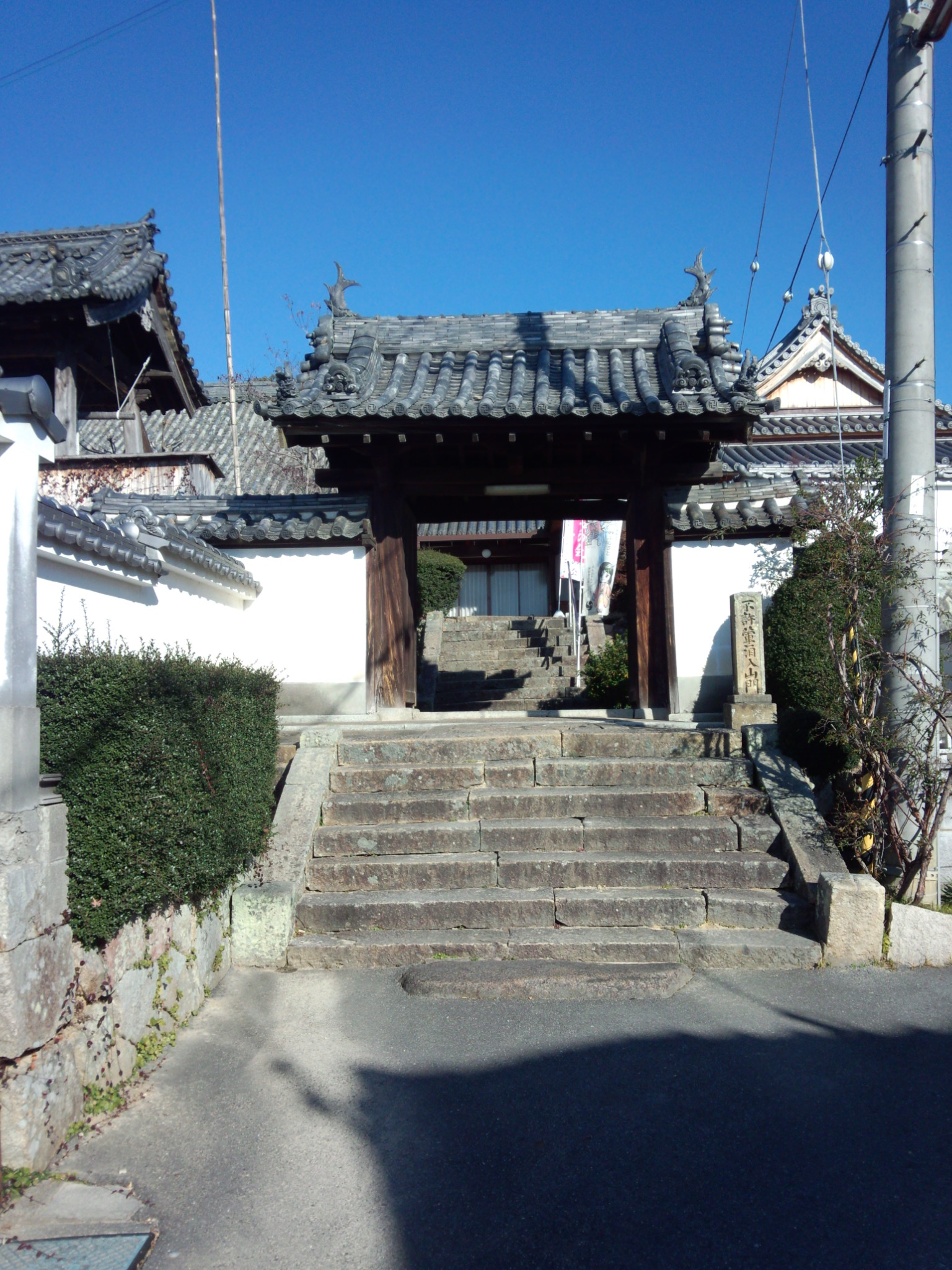 観音寺（志方城跡）